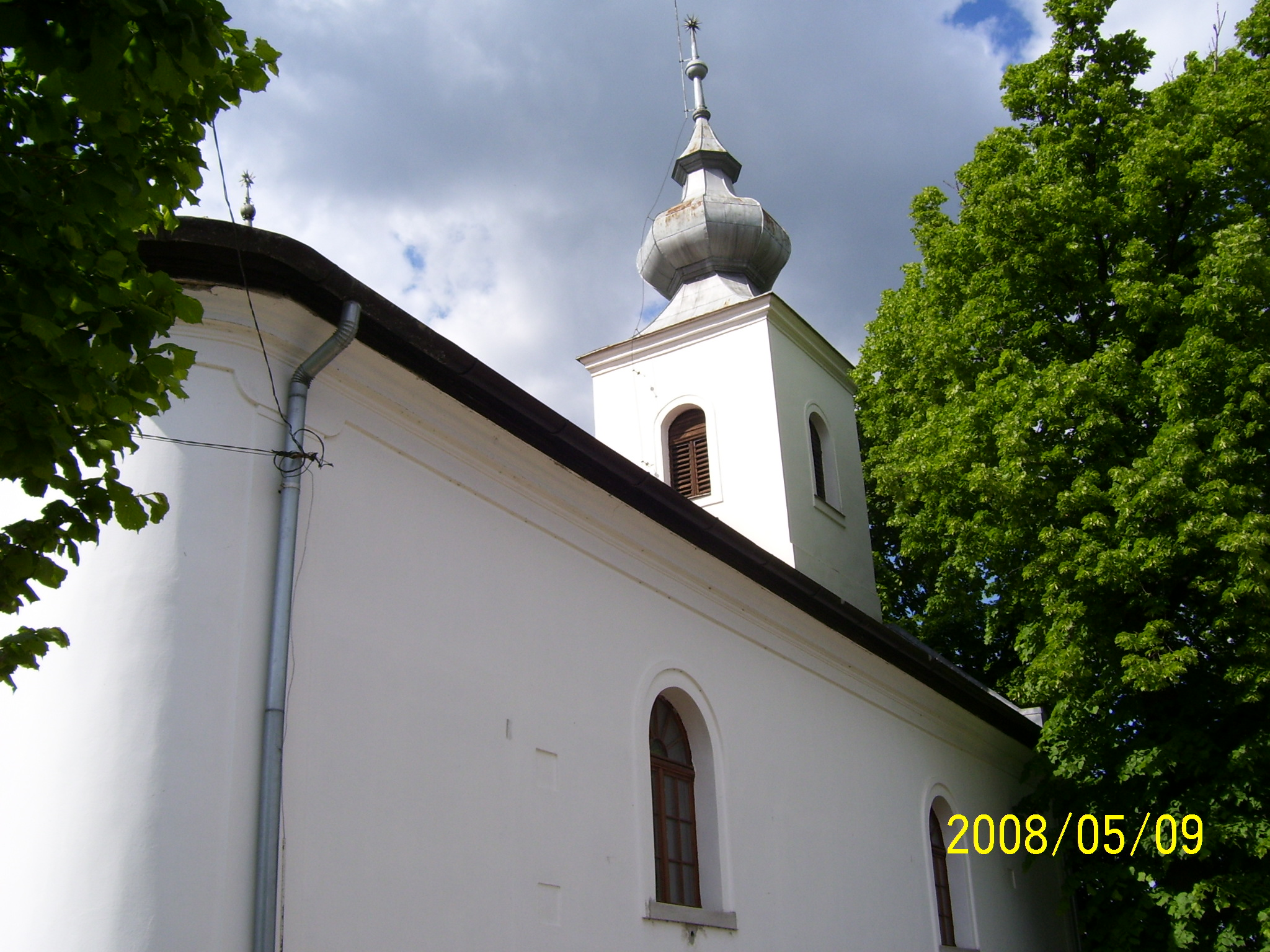 Dunabogdány - református templom